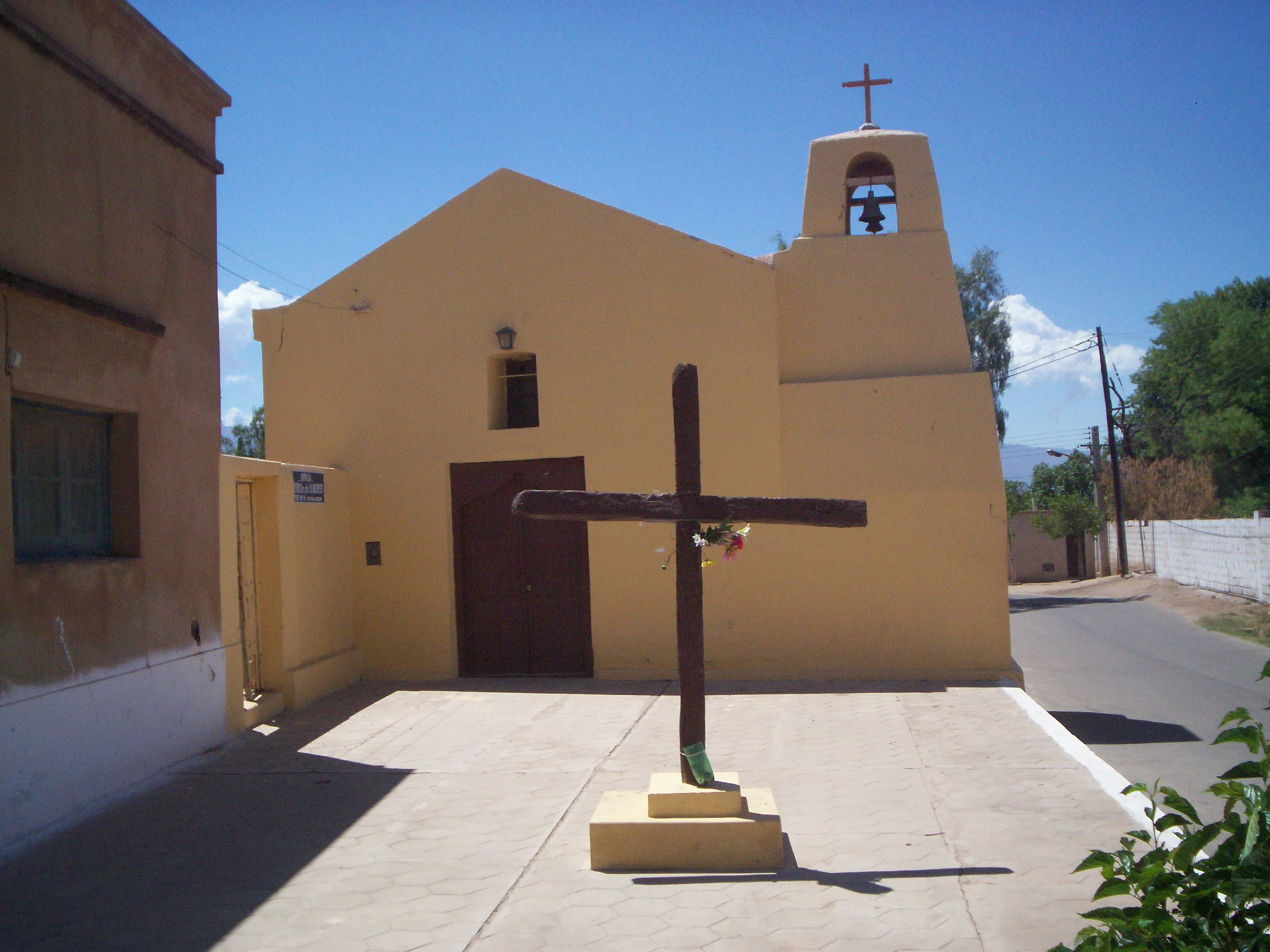 Capilla de la Virgen de la Merced, La Puntilla (Argentina).